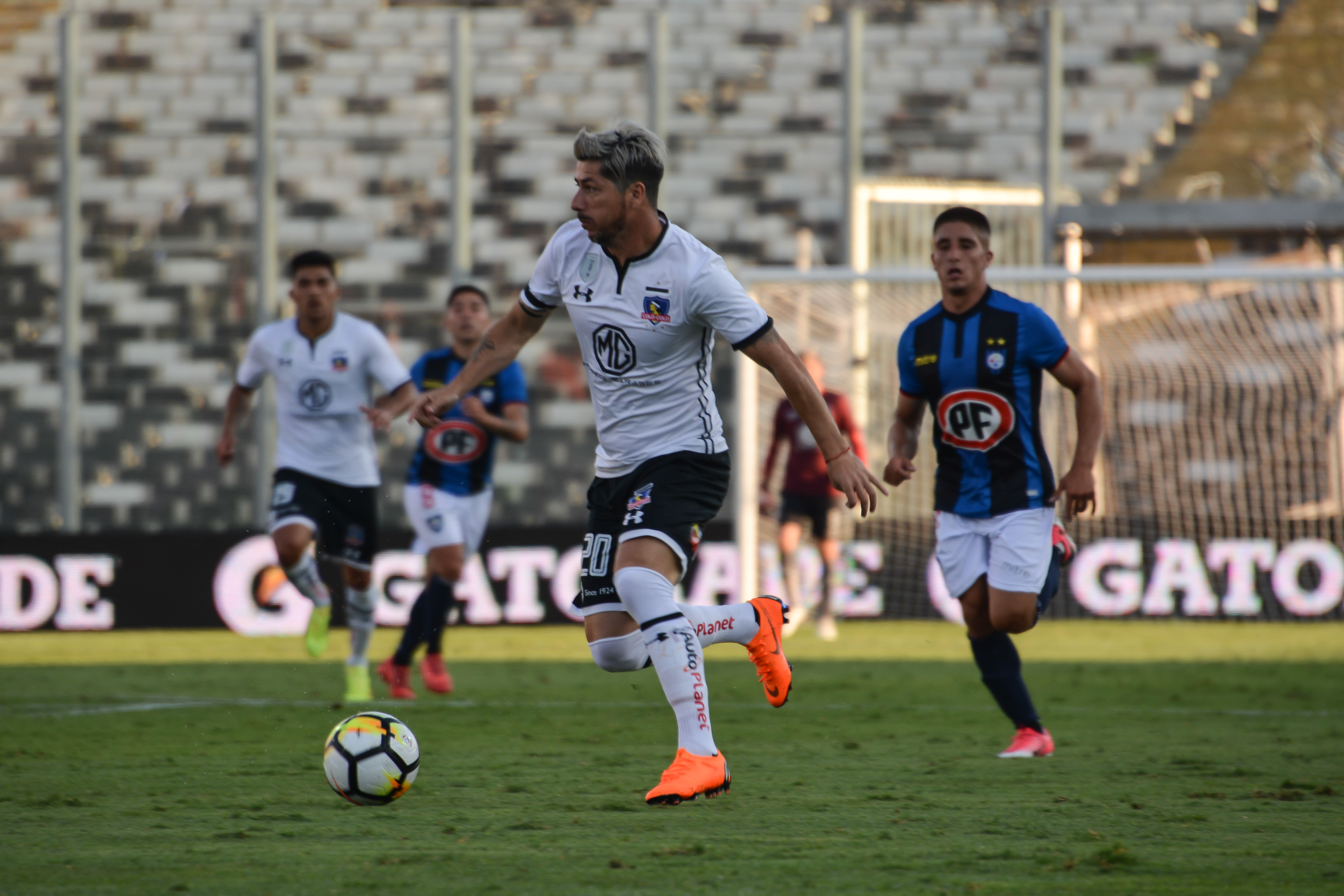 Colo Colo v Huachipato, Estadio Monumental, Santiago, Chile.